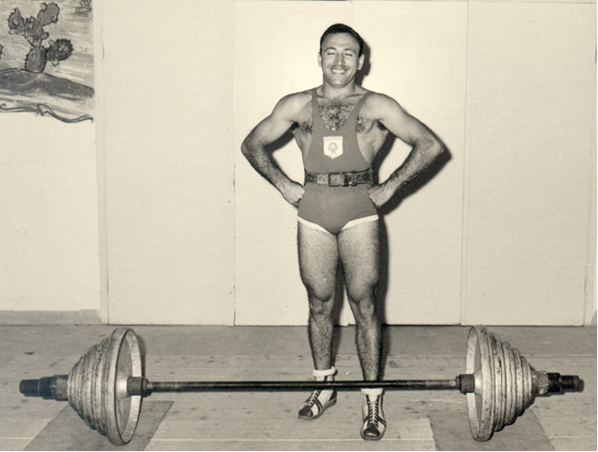 משקולן הפועל קריית חיים